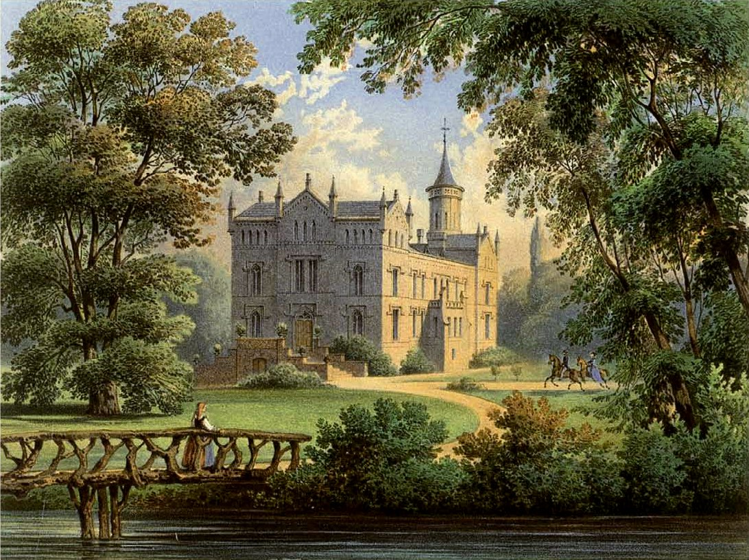 Schloss Kropstädt, Kreis Wittenberg, Provinz Sachsen, Lithografie aus dem 19. Jahrhundert